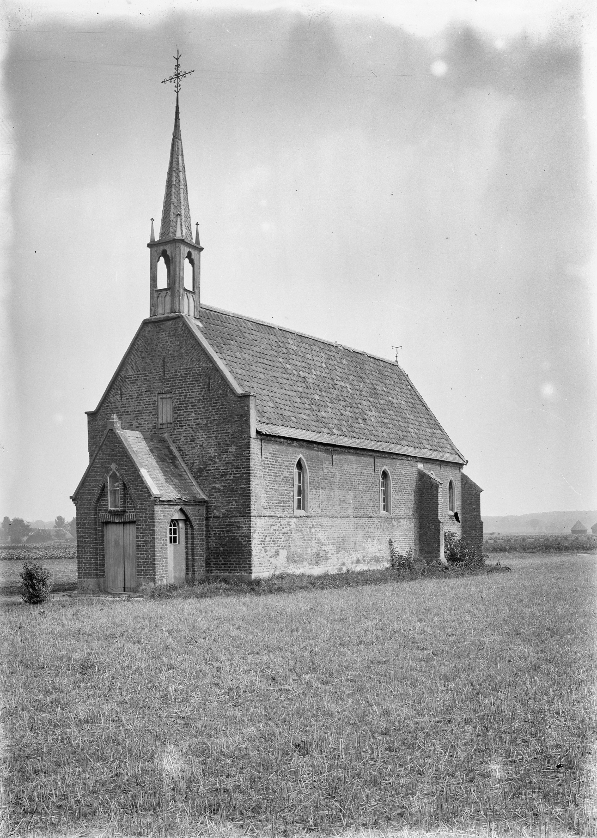 Kapel: exterieur vanuit het zuid-westen